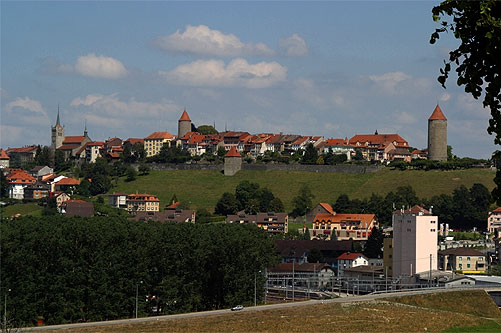 Romont (FR)